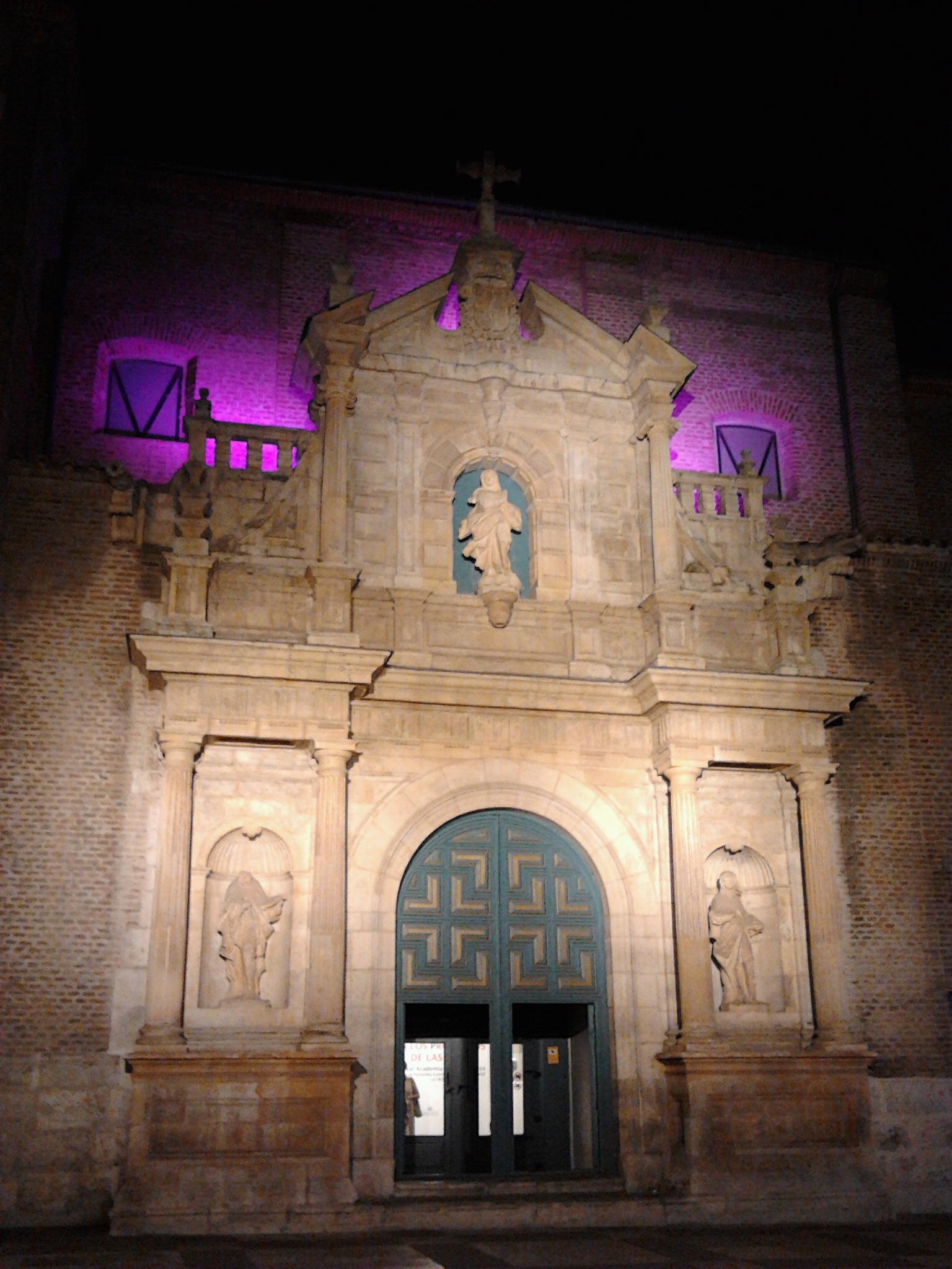 Convento de las Comendadoras de Santa Cruz Convento de Dominicas Franciscanas